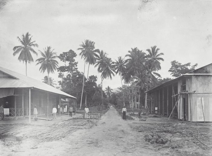 foto. Straatgezicht met stapels rotan in Parigi, Celebes